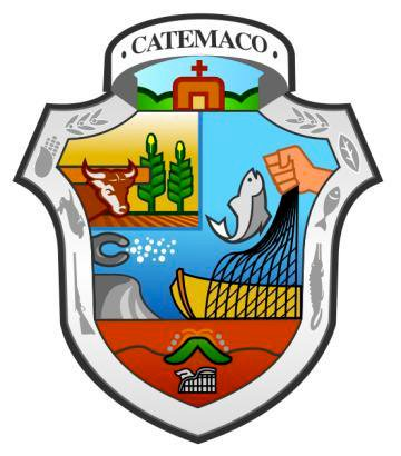 Escudo de Catemaco del trieno de 2011-2013 de Eliuth Cervantes